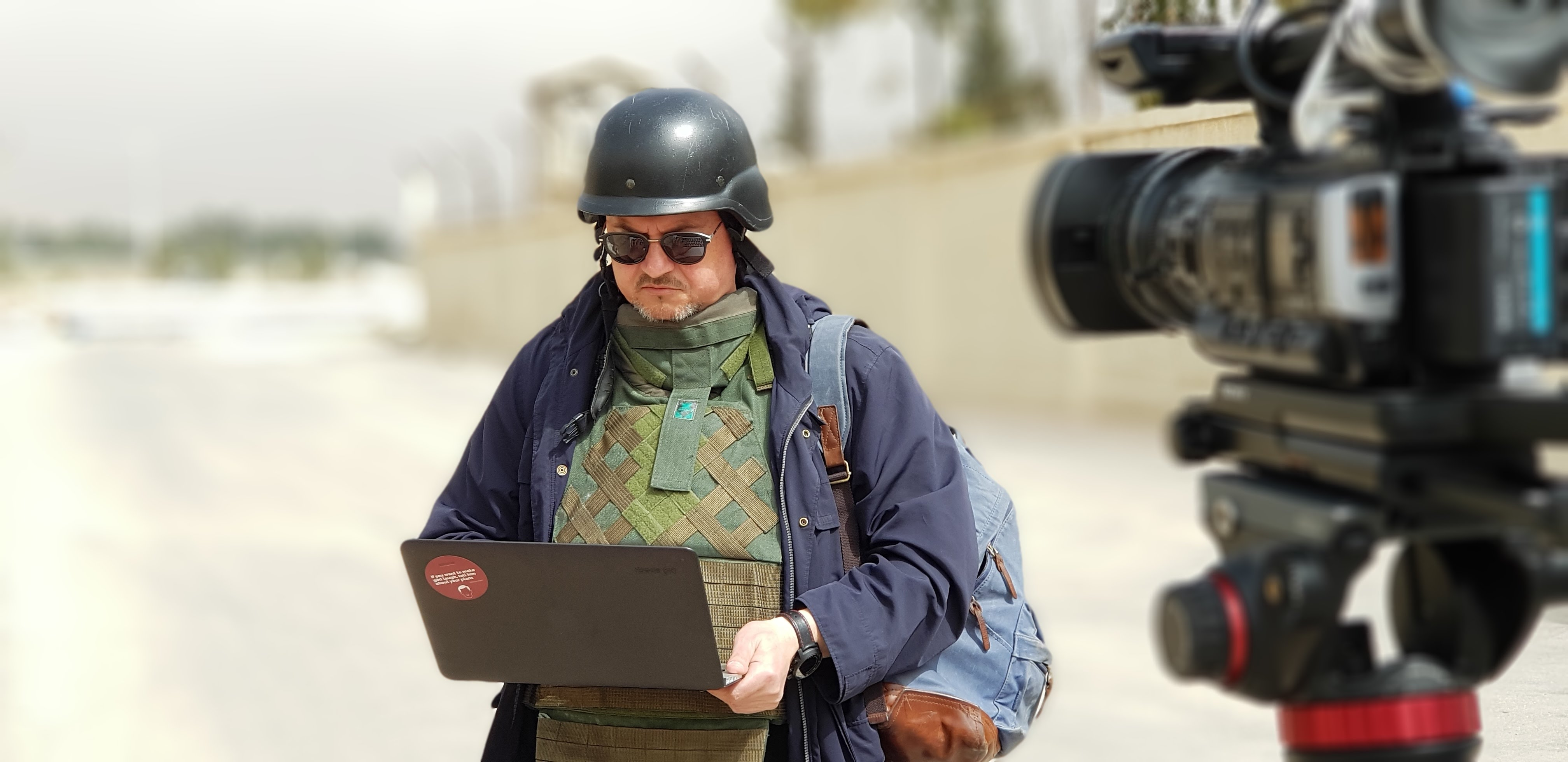 В. П. Фефилов в Сирии, в Восточной Гуте под Дамаском. Апрель 2018 года. Фотограф Антон Васильевич Щербаков.